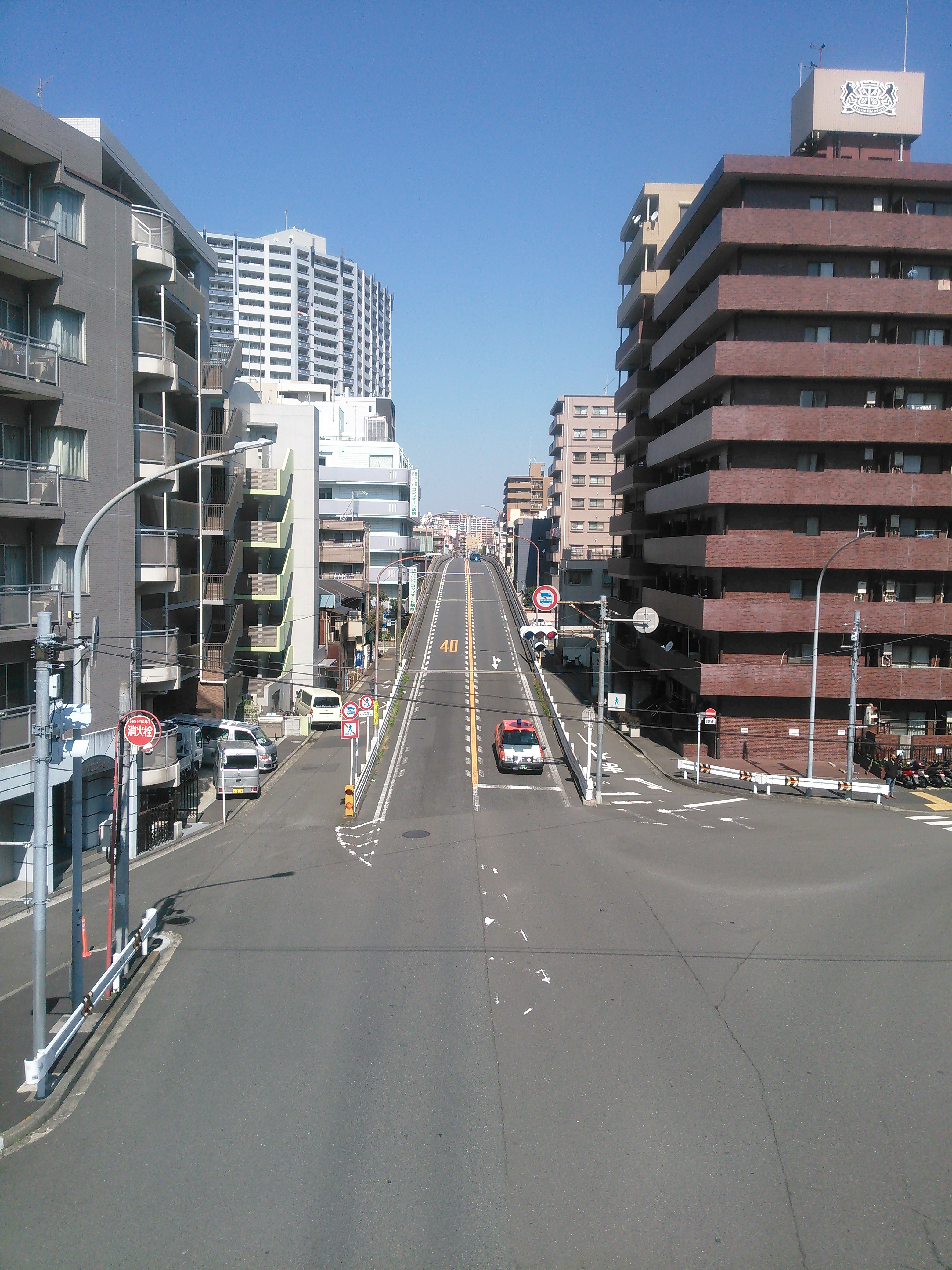 横浜市西区、平沼一之橋。国道1号側より